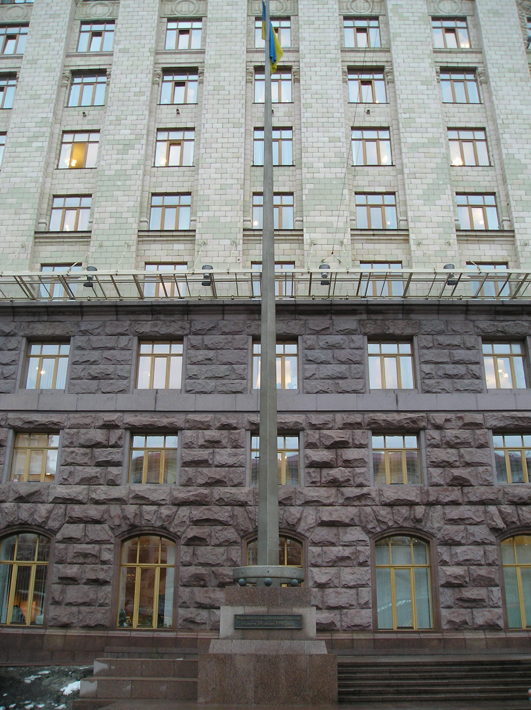 Український прапор поблизу Київської міської державної адміністрації.